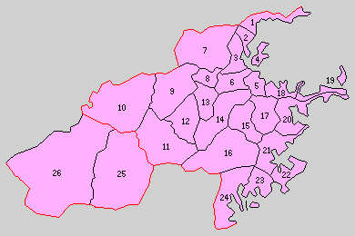 大分県南海部郡の町村制時点の町村。